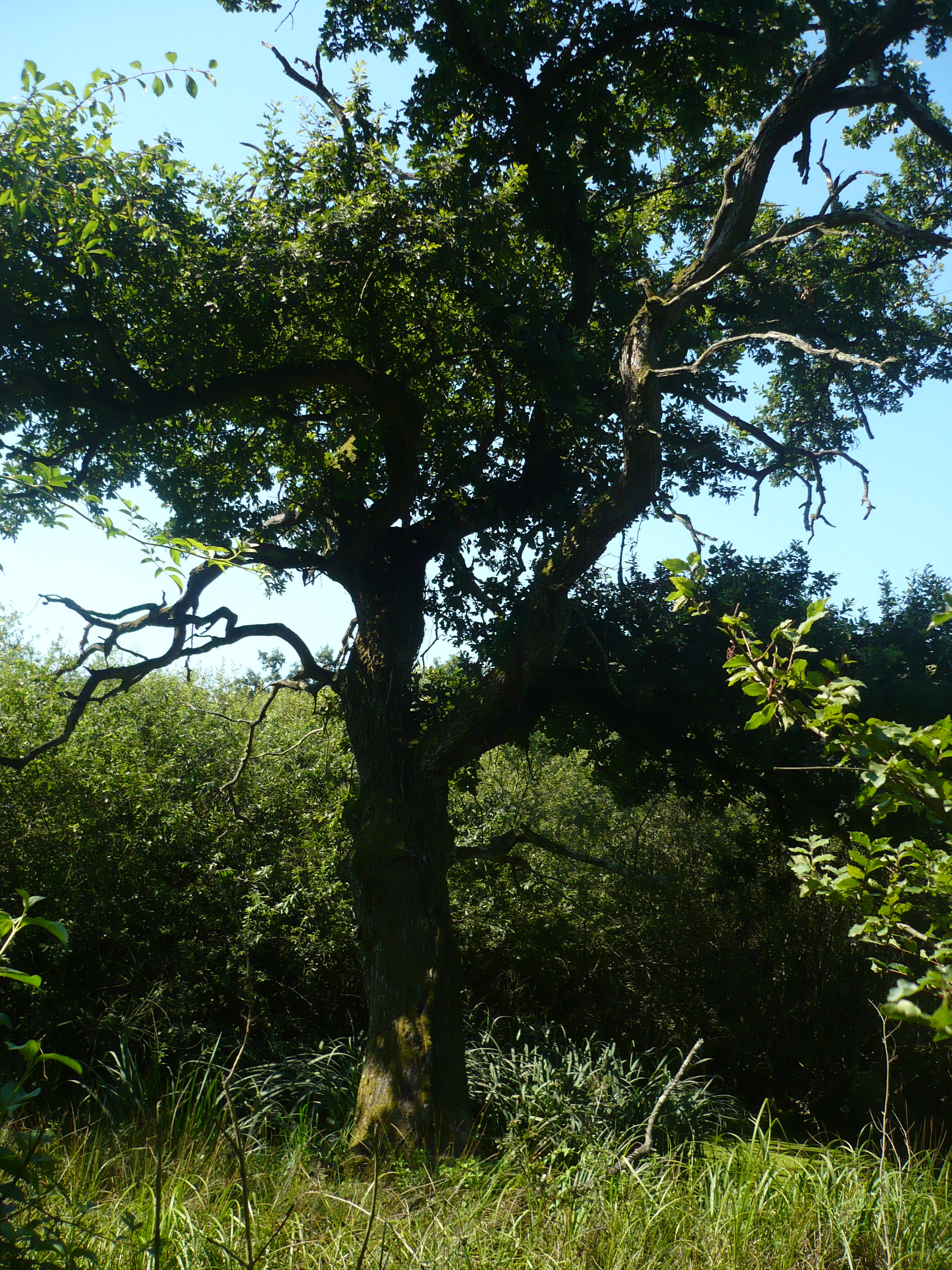 Idős tölgy Monostorszegen, a Kozara erdőben (Szerbia)